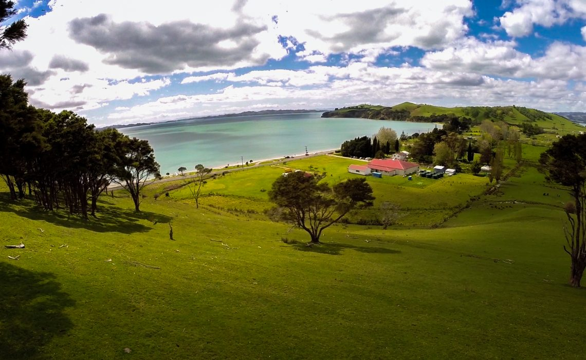 Māori: Landscape